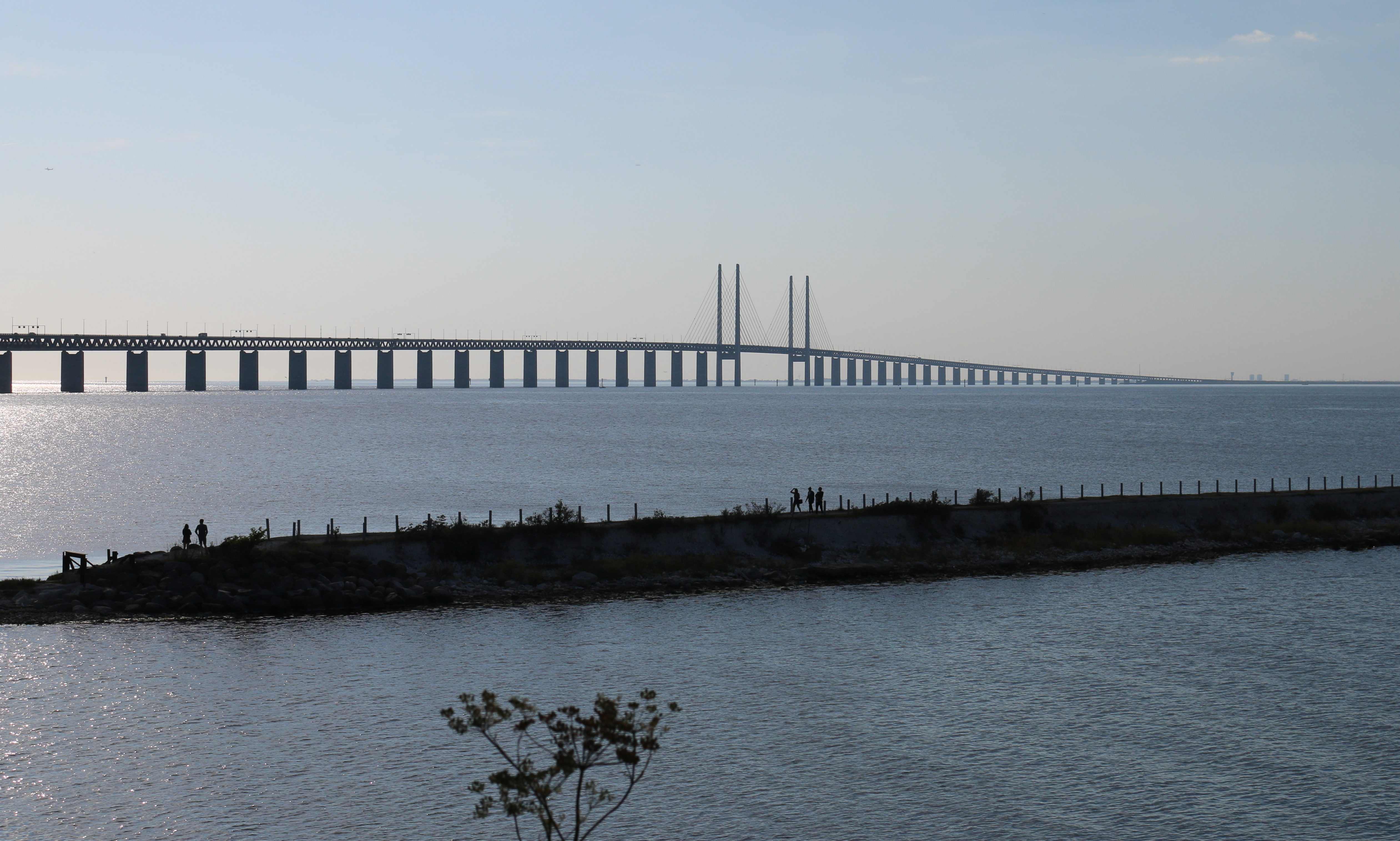 Öresundsbron från Lernacken